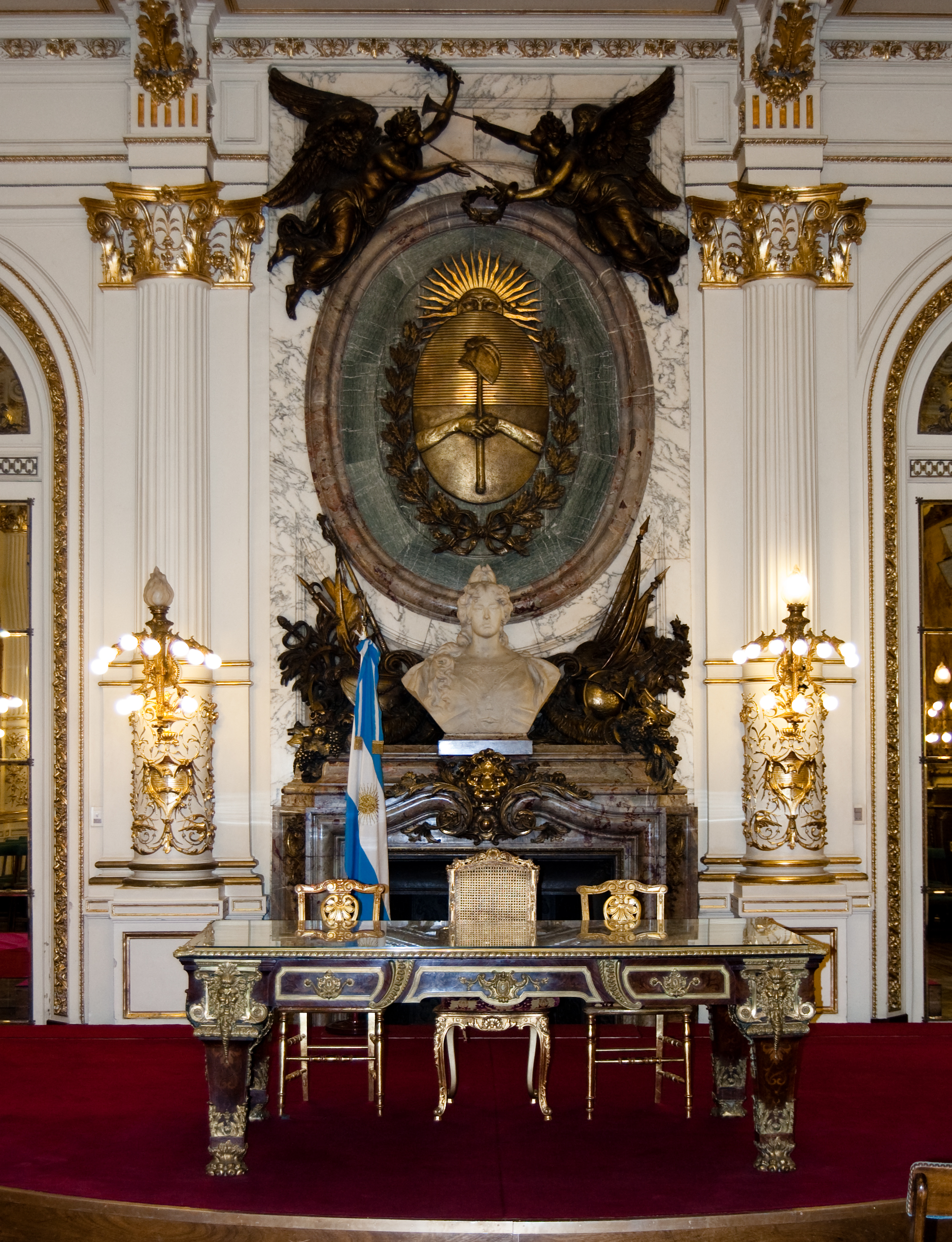 Vista parcial del Salón Blanco de la Casa de Gobierno, Buenos Aires. Se pueden apreciar el escritorio utilizado para actos oficiales, el busto de la República y el escudo nacional argentino.